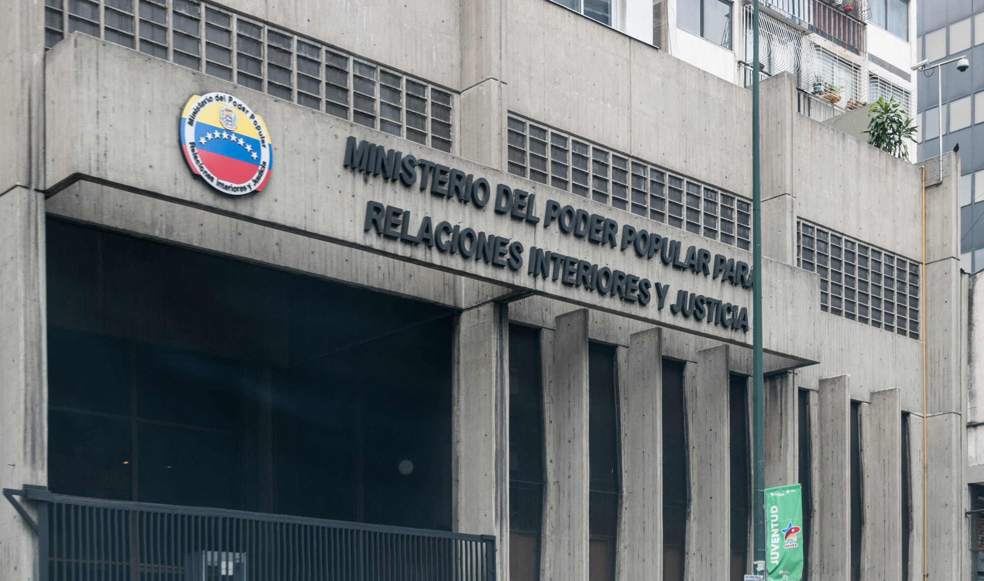 Ministerio de Interior y Justicia. Caracas, Venezuela